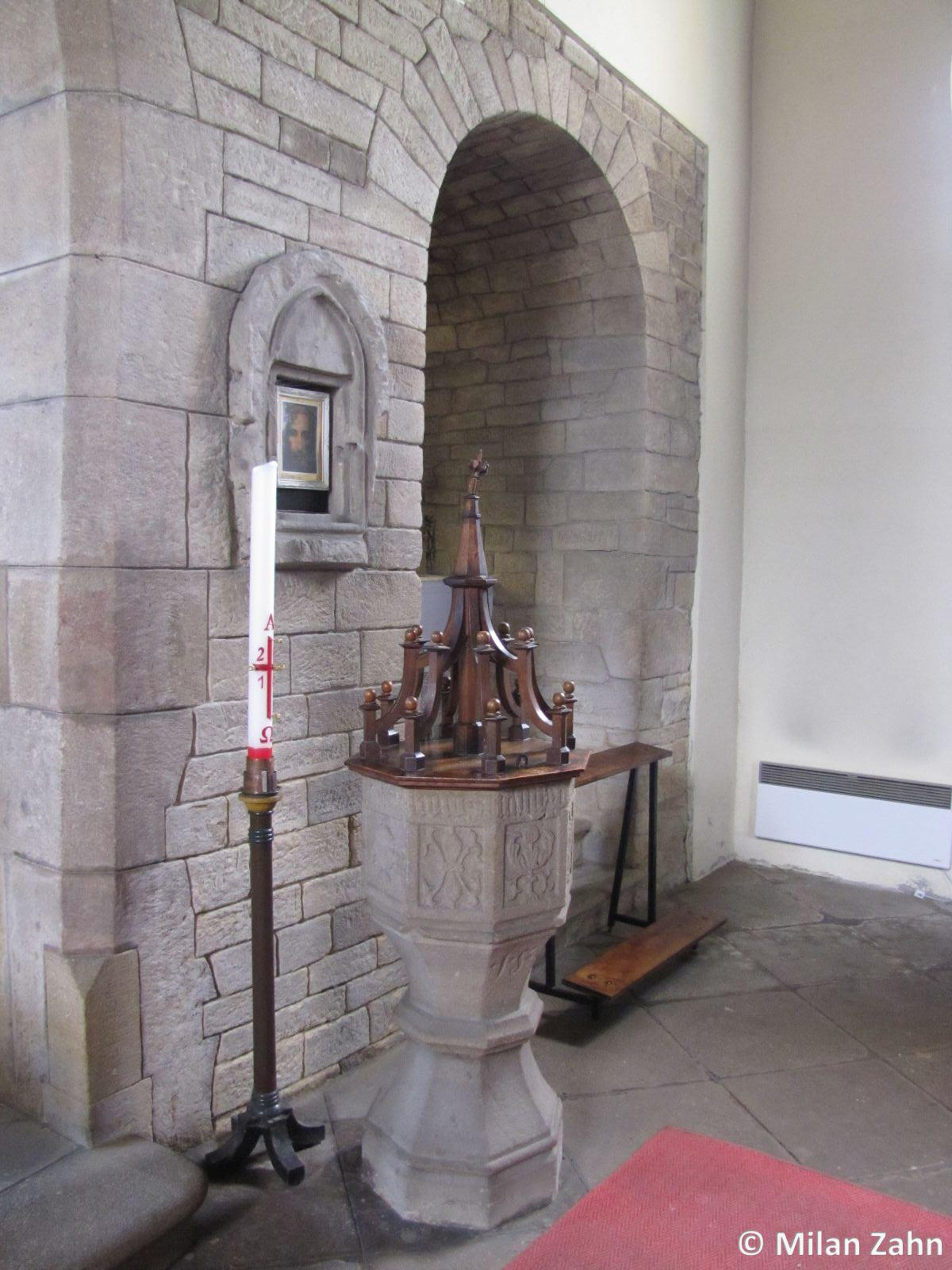 Interiér kostela svatého Jiří v Plzni